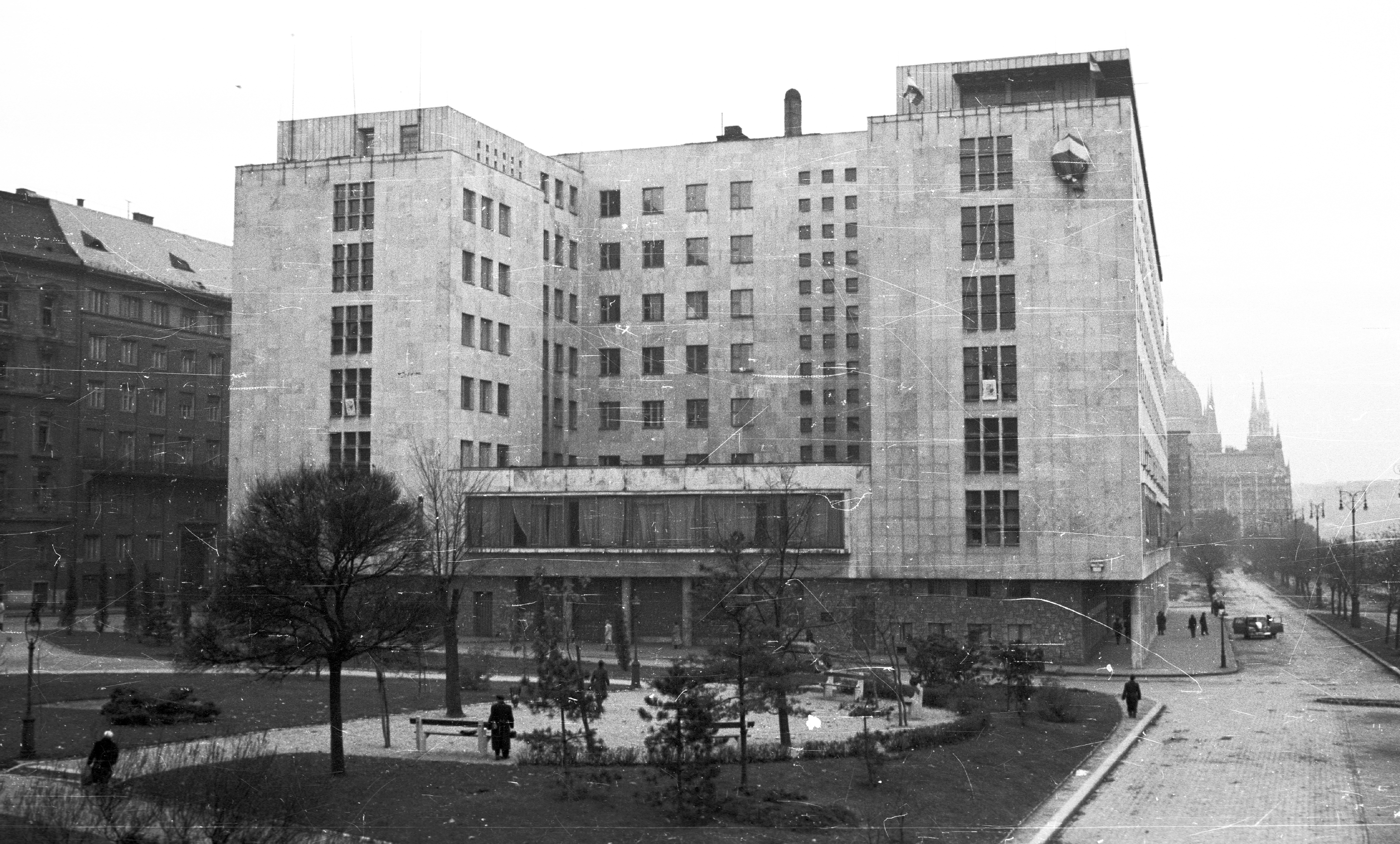 Jászai Mari tér, az ÁVH egykori, ekkor már a BM-hez tartozó épülete, a mai Képviselői Irodaház ("Fehér Ház"). Location: Hungary, Budapest V. Tags: revolution, public building, Budapest Title: Jászai Mari tér, az ÁVH egykori, ekkor már a BM-hez tartozó épülete, a mai Képviselői Irodaház (\